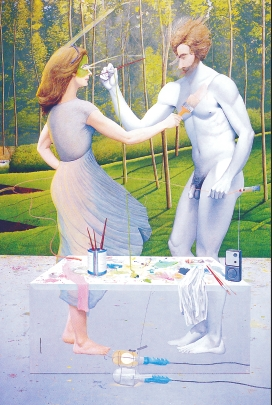 “Bikotearen erretratua”, 1982, Ramon Zuriarrain